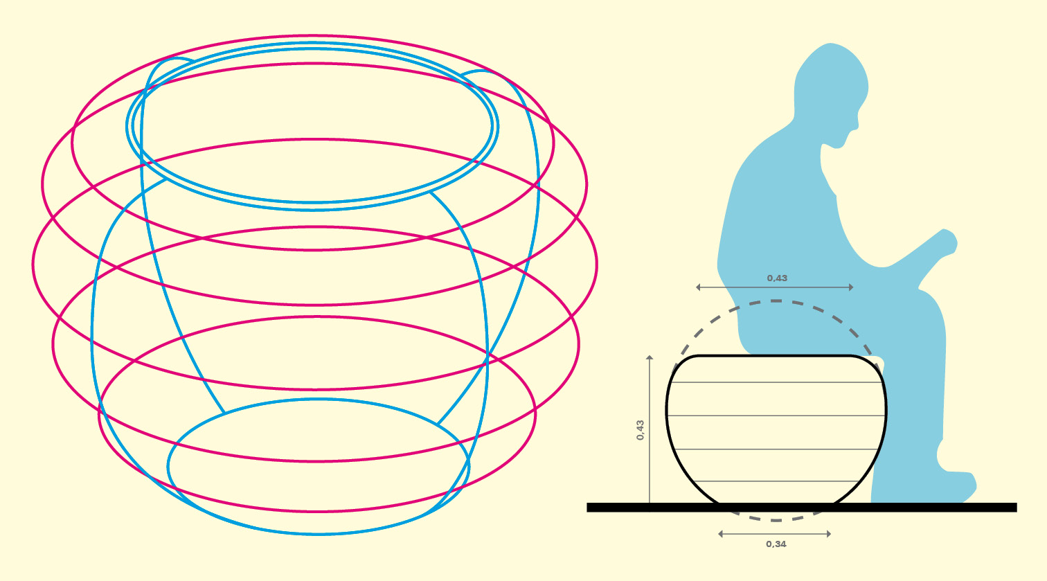 Diagrama de las esferas de hormigón aplanadas a modo de asiento que conforman las «marcas de la memoria».